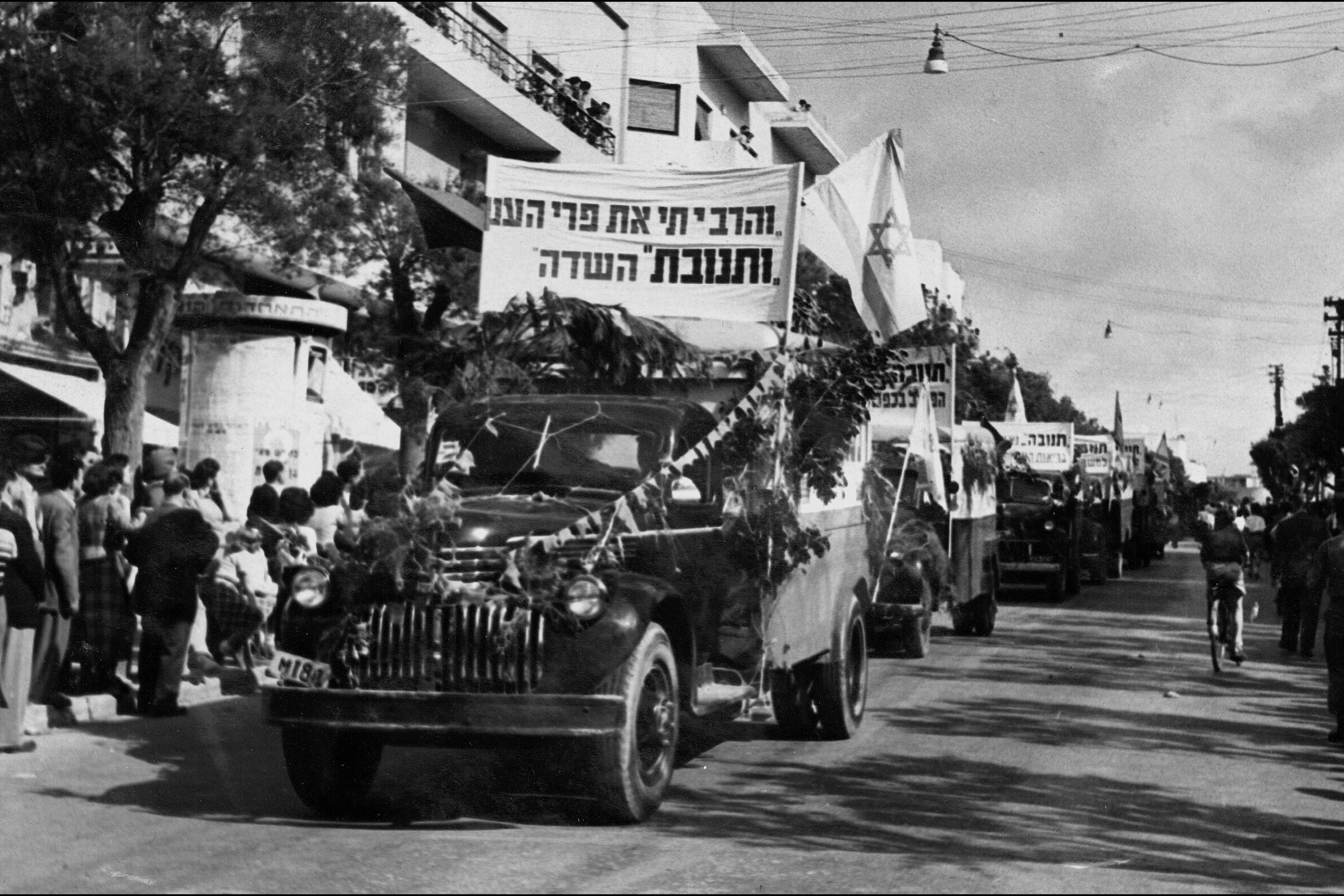 Agricultural workers take part in Tel Aviv's May Day Pararde. חקלאים משתתפים במצעד האחד במאי בתל אביב